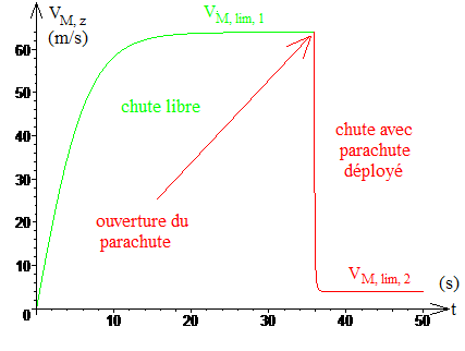 Tracé du diagramme horaire de vitesse d'un parachutiste tombant d'abord en chute libre puis avec parachute déployé